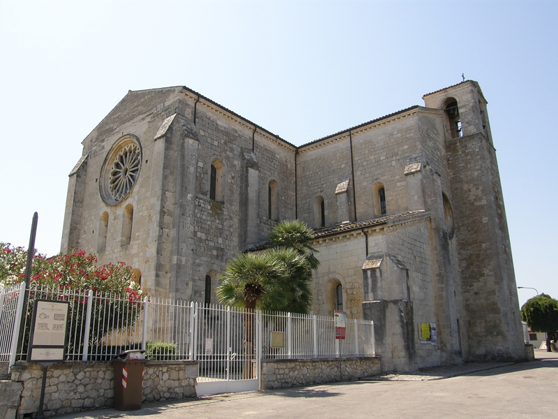 Santa Maria Arabona (Manoppello)